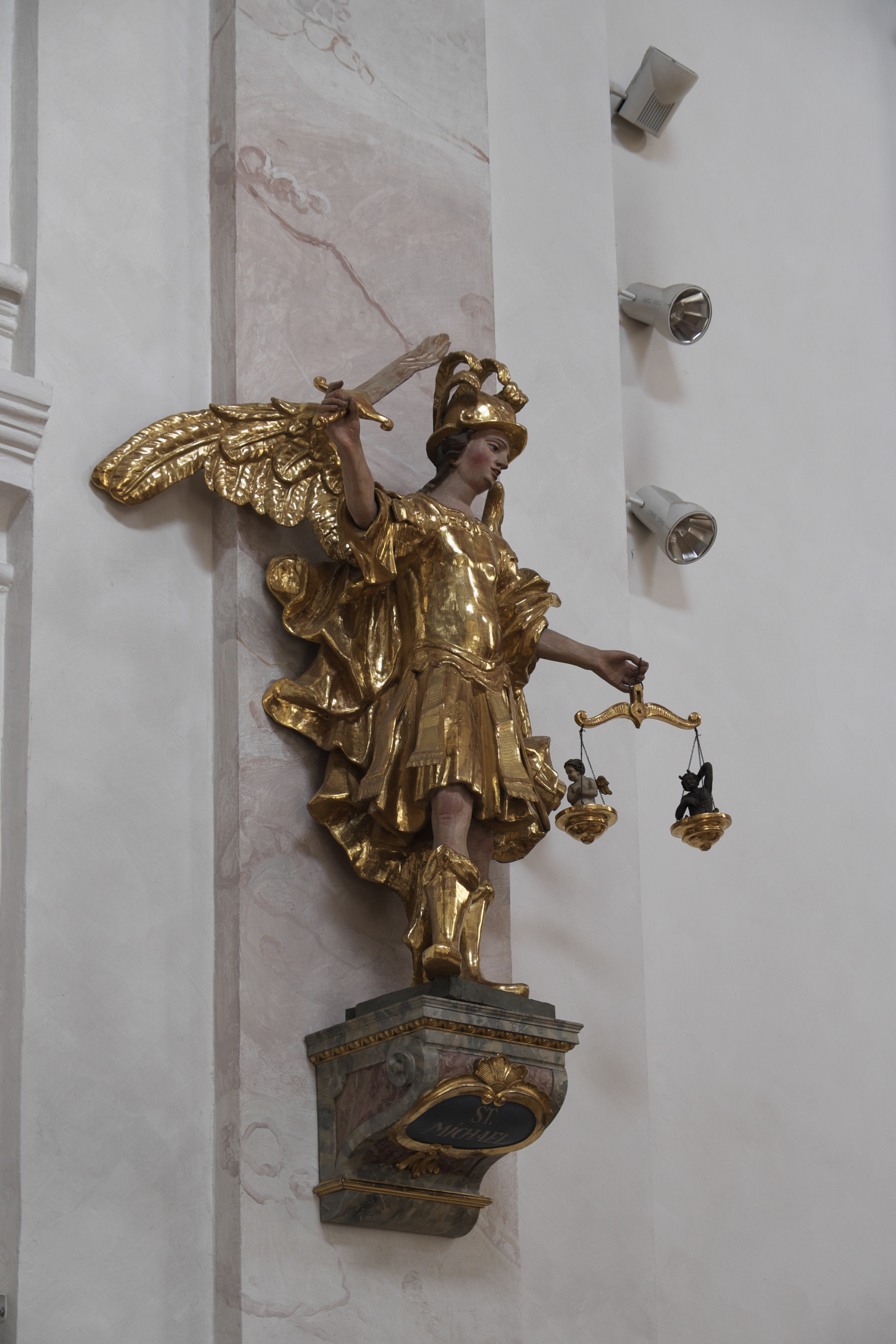 Katholische Pfarrkirche St. Martin in Waging am See im Landkreis Traunstein (Bayern/Deutschland), Erzengel Michael